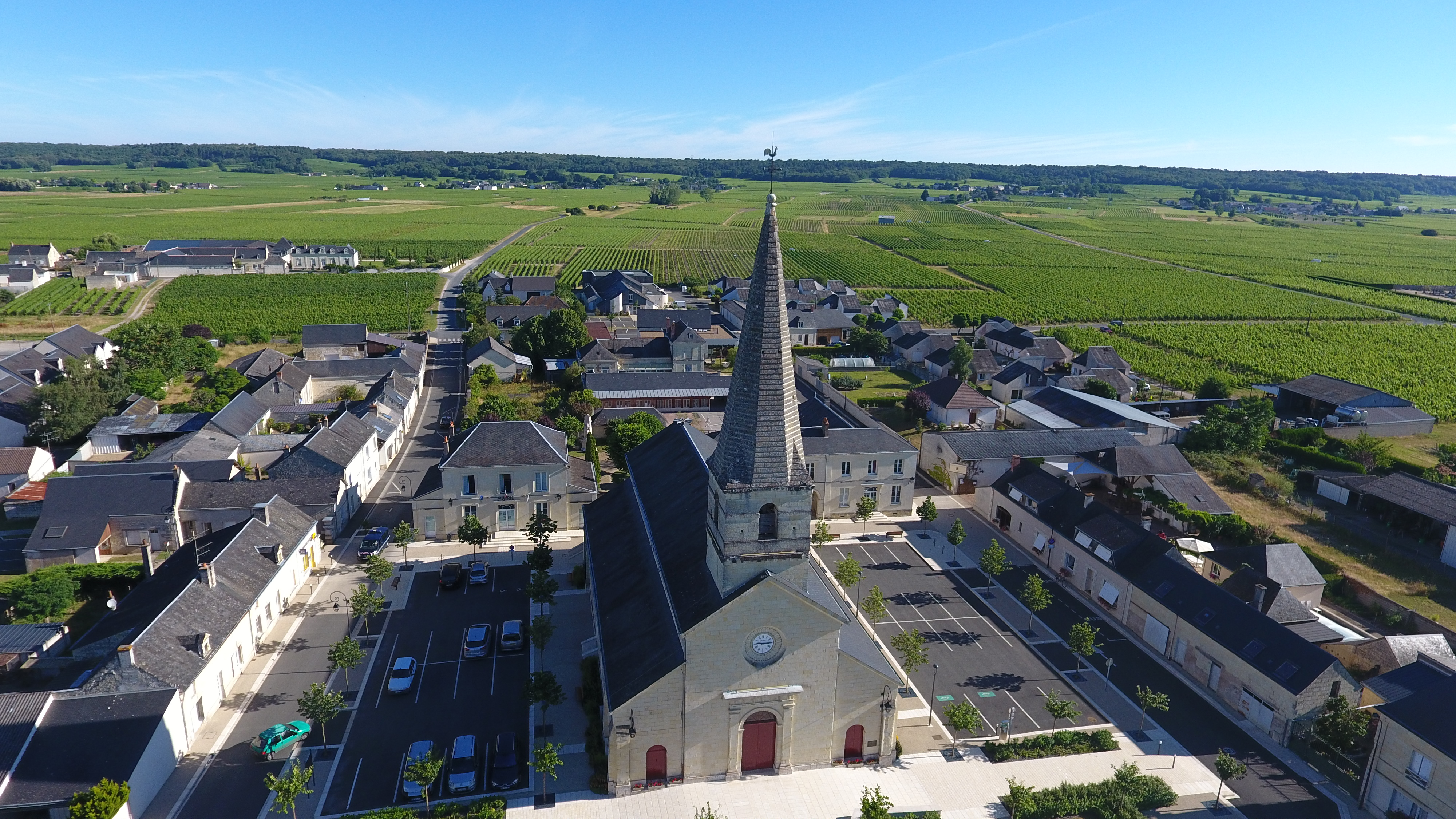 Saint Nicolas de Bourgueil vue du ciel (photo drone, Comm'une Image)